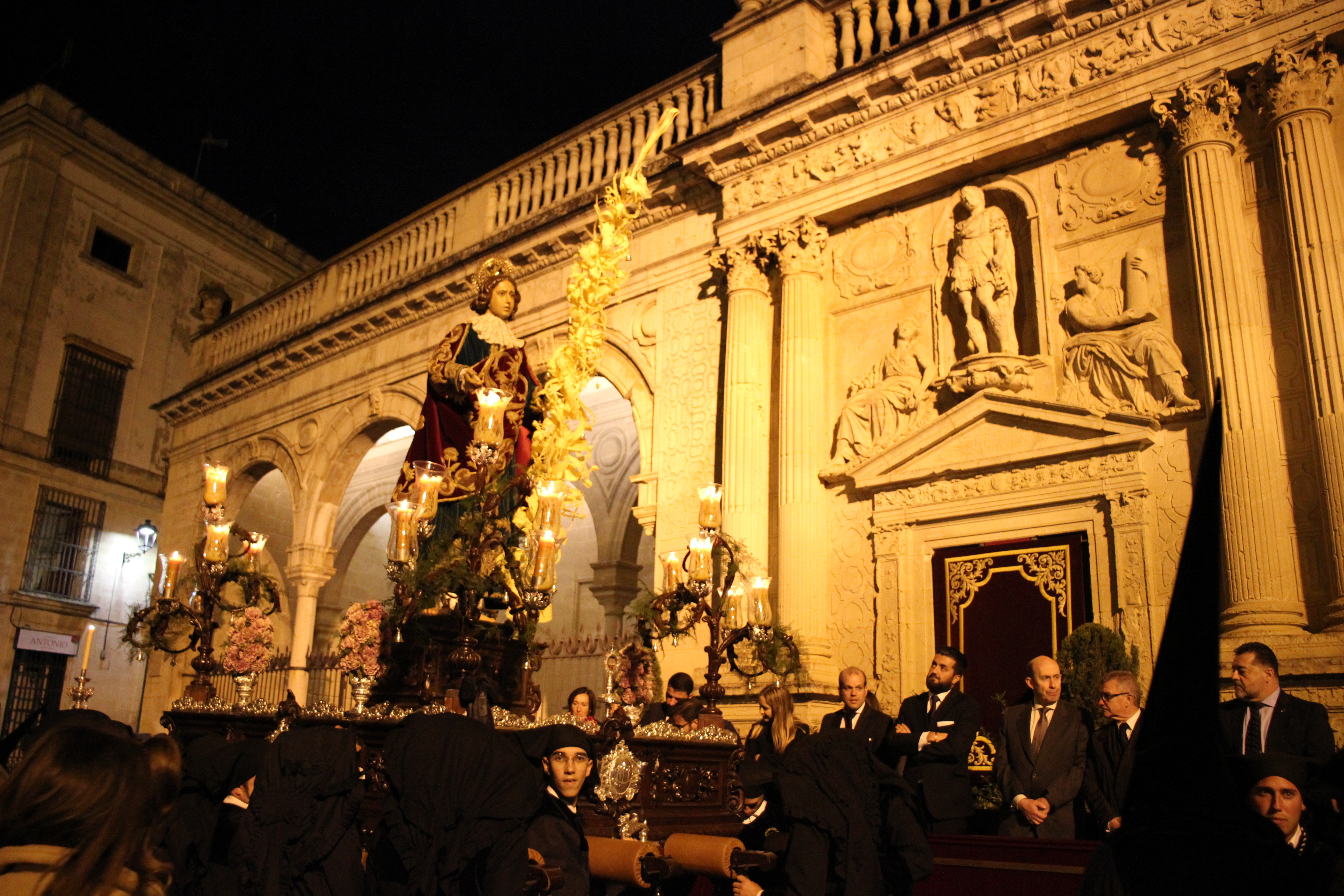 Hermandad de la Expiración (Jerez)